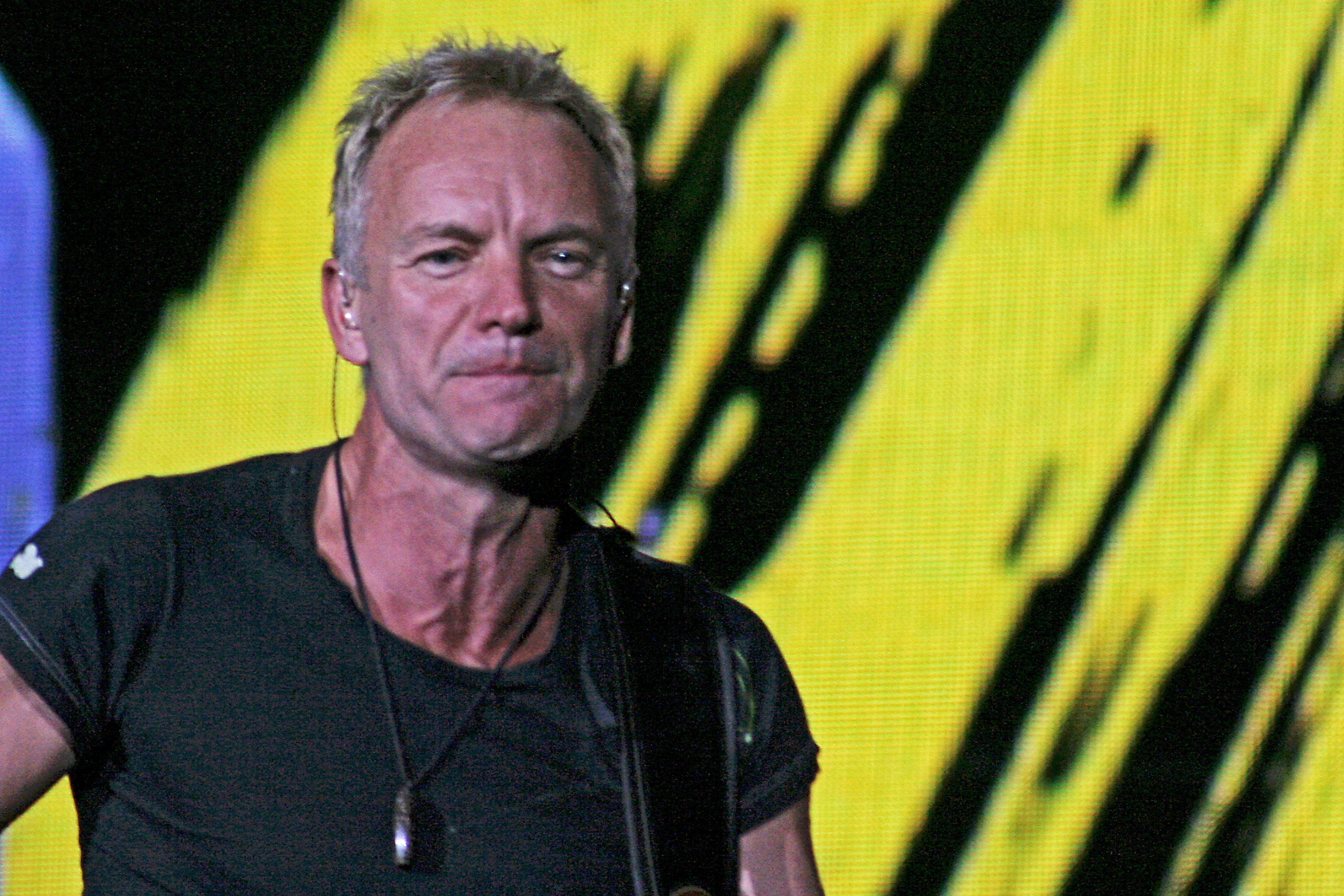 Sting